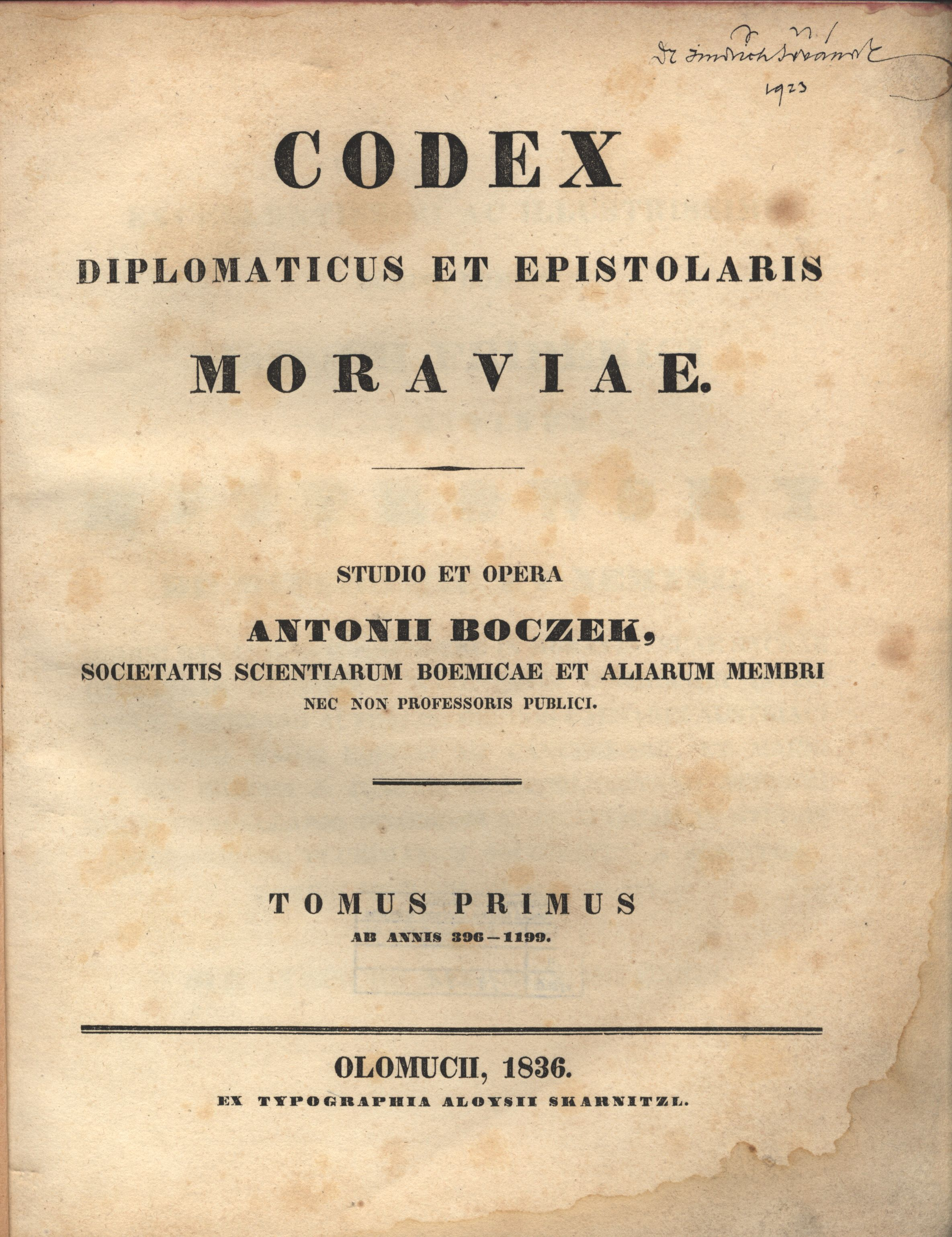 Titulní strana prvního dílu ediční řady Codex diplomaticus et epistolaris Moraviae